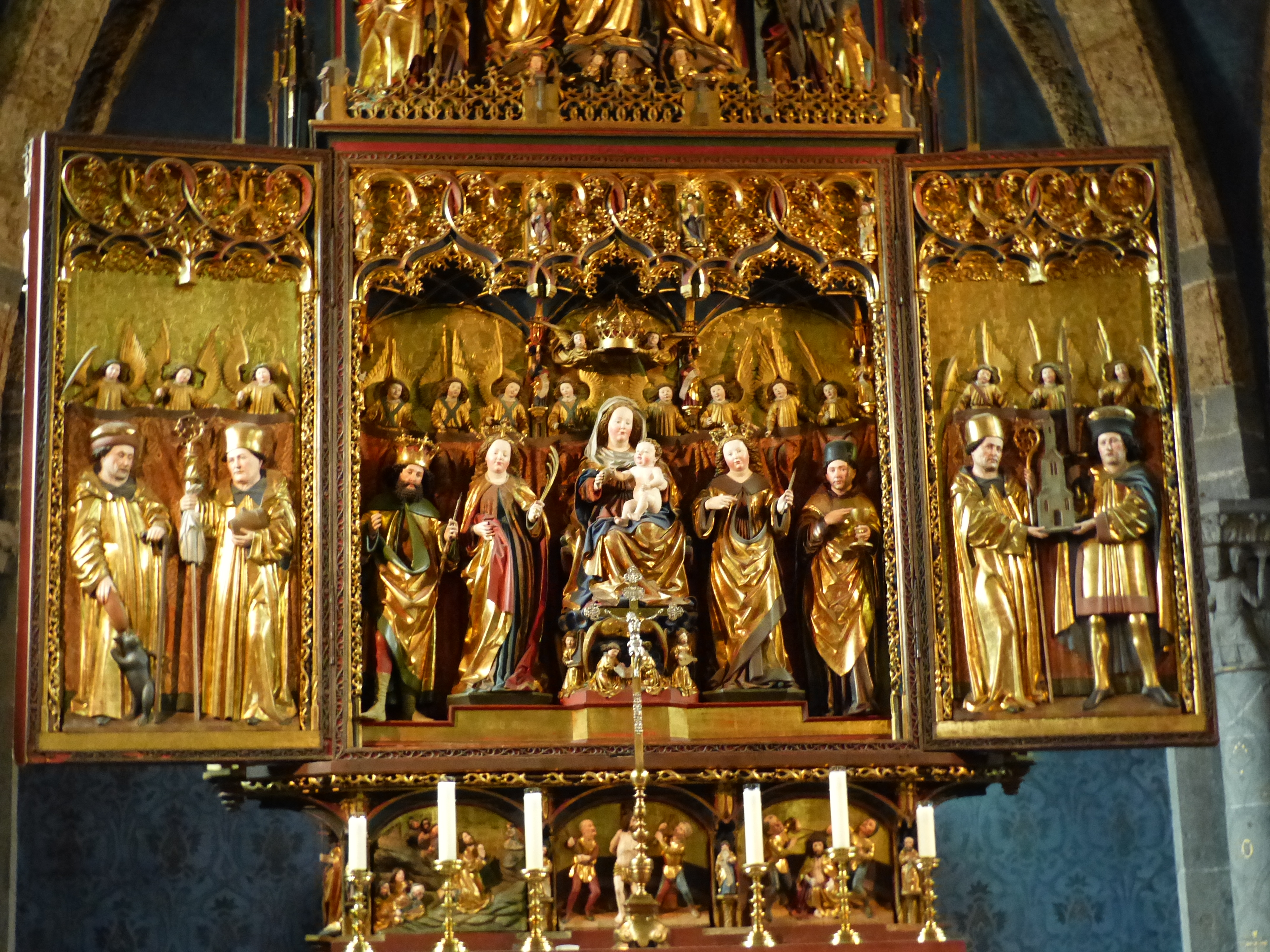 Hochaltar von Jakob Russ (Fertigstellung 1492) in der Kathedrale St. Mariä Himmelfahrt, Chur Jakob Russ Alternative namesJacob Russ, Jakob Ruß, Jakob Ruess, Jacob RuossDescription German sculptor Work period1482–1506Work locationRavensburg, Chur, ÜberlingenAuthority control VIAF: 74653109 ISNI: 0000 0001 1985 3095 ULAN: 500054697 LCCN: nr94041810 GND: 118970984 WorldCat